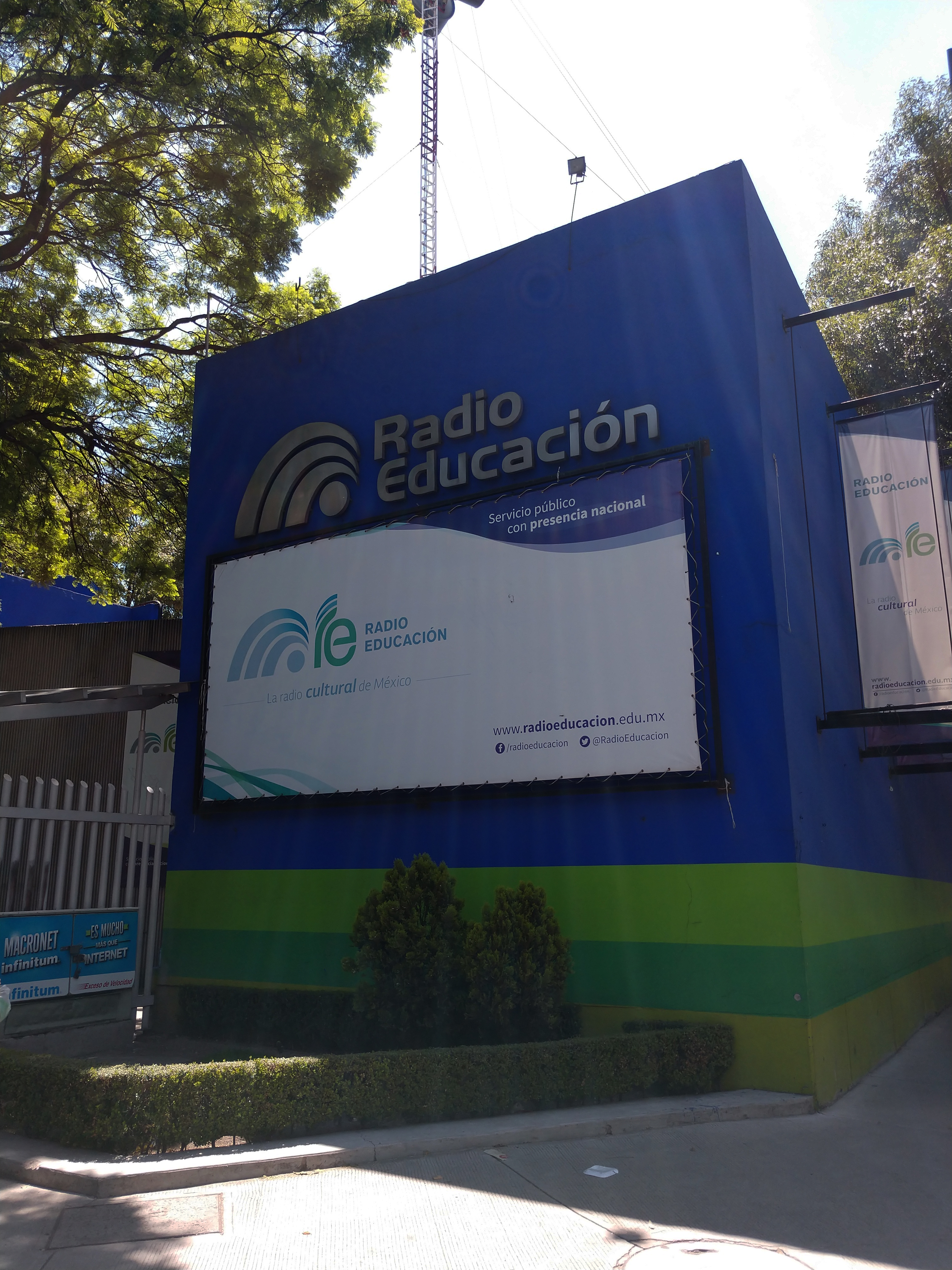 Ciudad de México